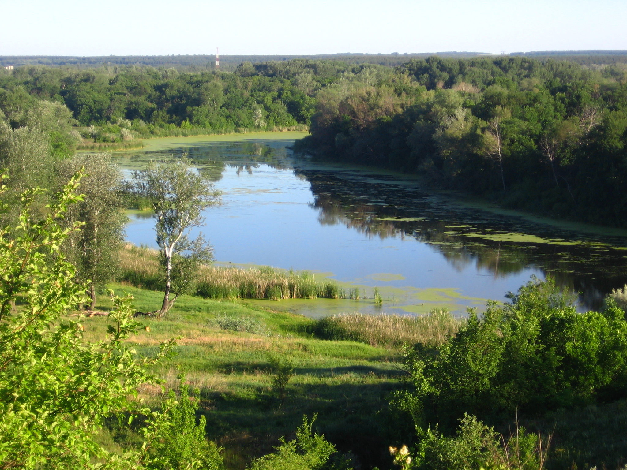 Mertvy Donets (literally means Dead Siversky Donets) near Luhansk